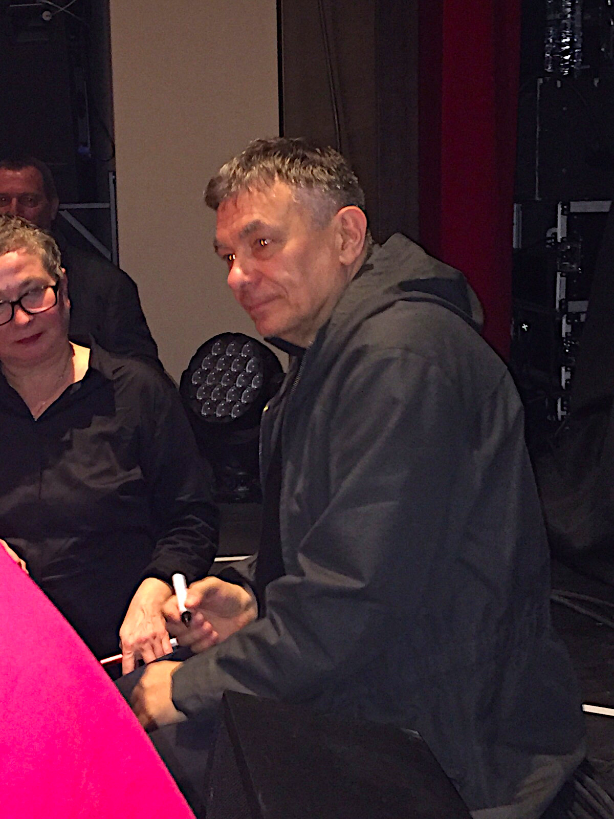 Karl Bartos beim Signieren im Anschluss an ein Konzert am 21. November 2015 in Leipzig.